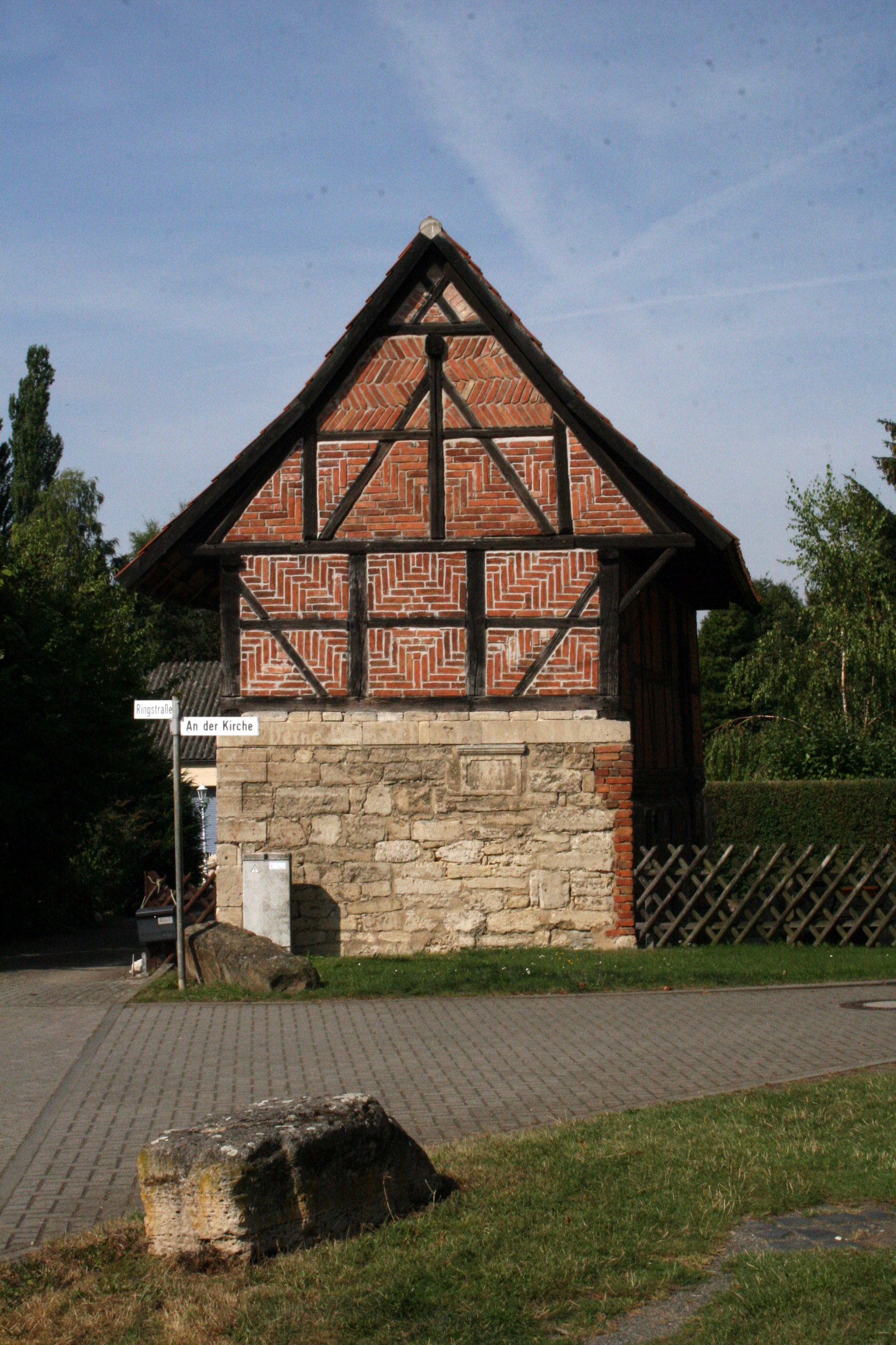 Scheune in Hachum östlich der Kirche von Hachum an der Ringstraße